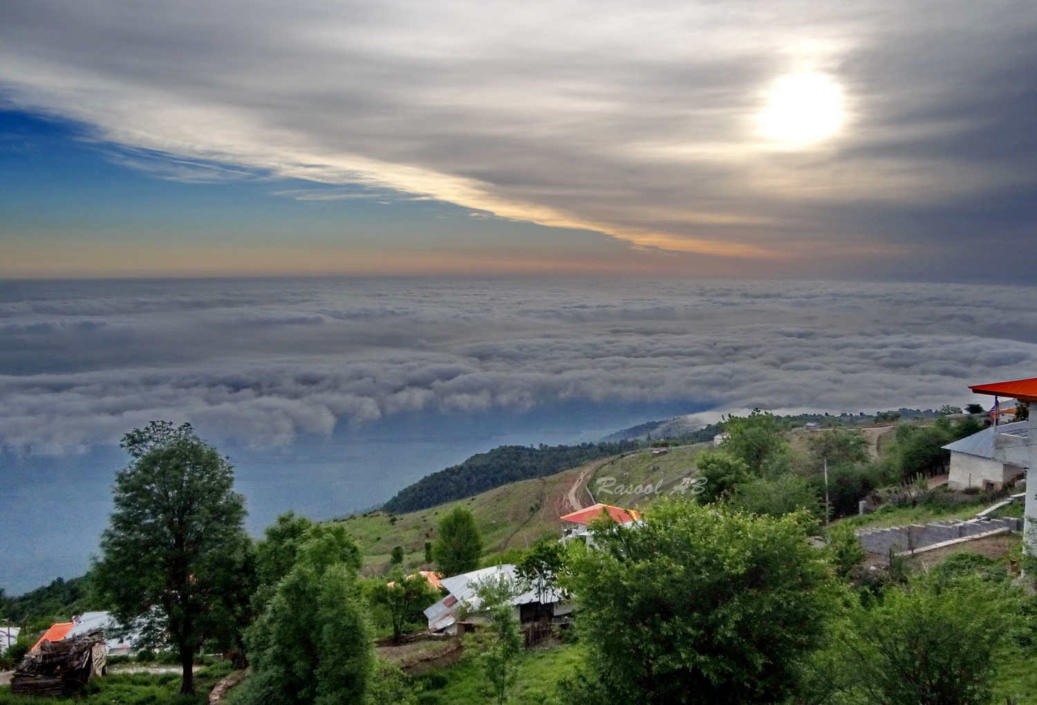 روستای زیبای فیلبند